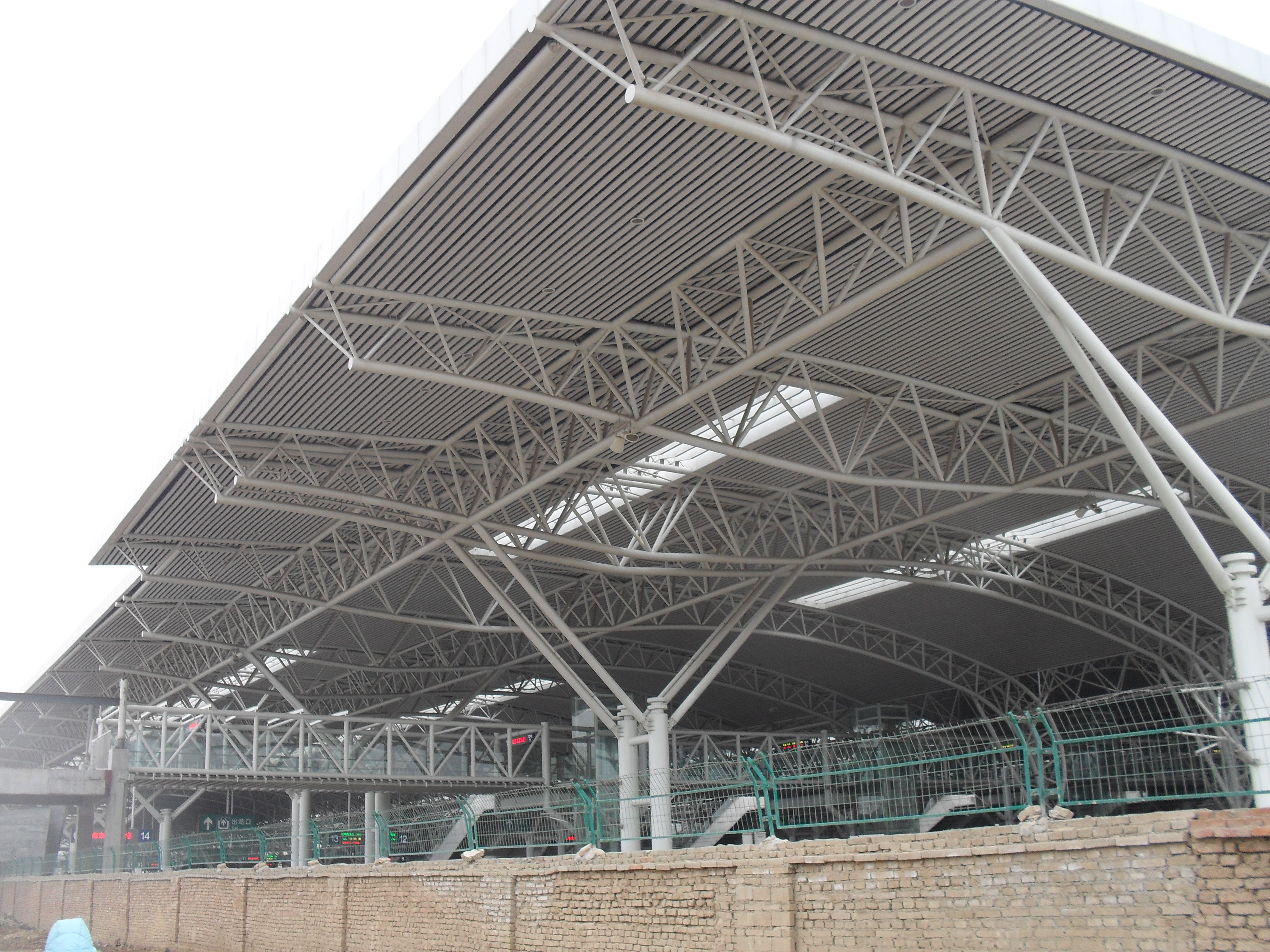 南京黄家圩看南京站